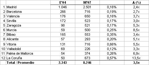 Resultados del partido político Por Un Mundo Más Justo (PUM+J) en las elecciones de Mayo de 2007 en España.